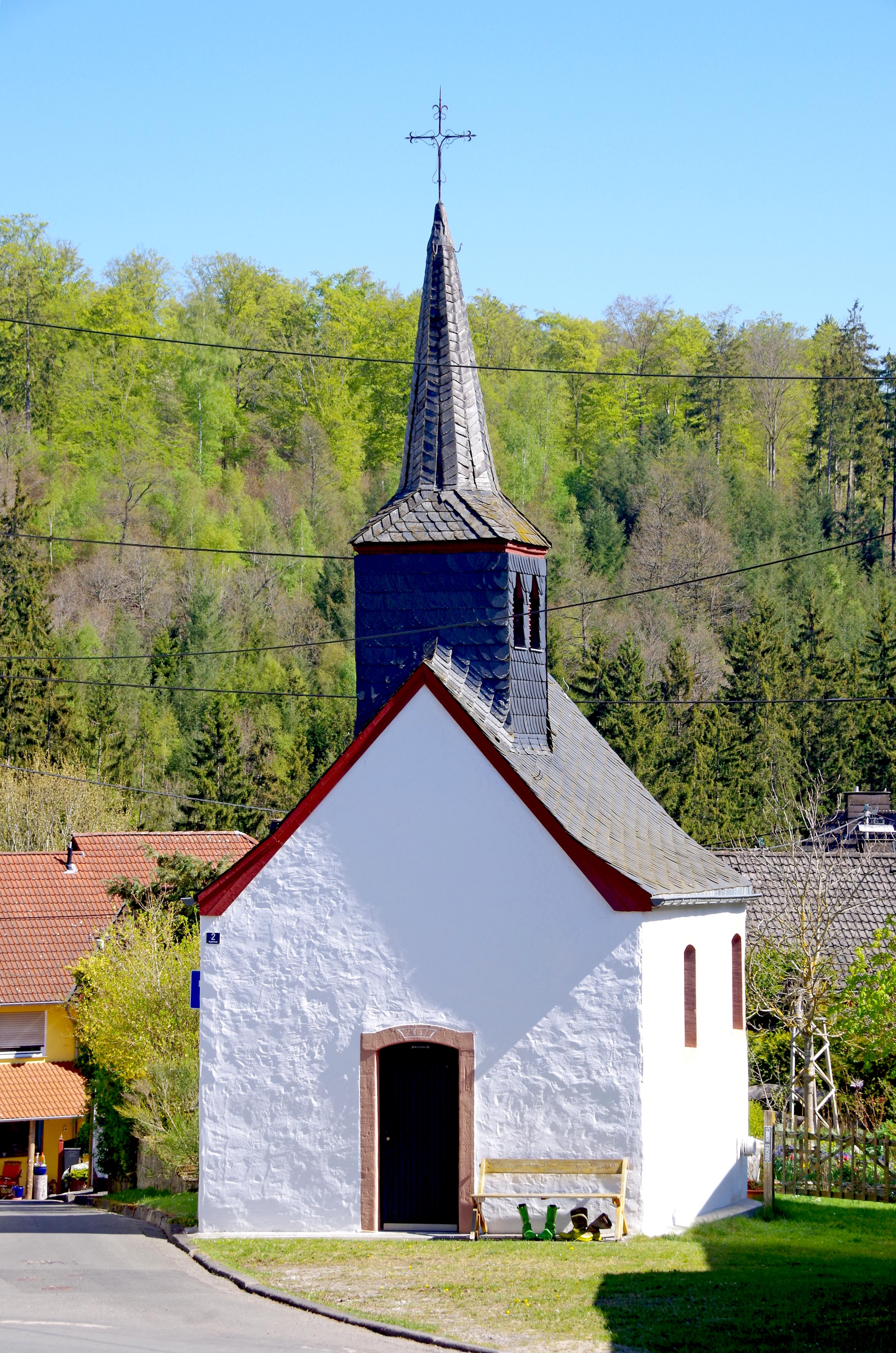 St. Michael und Brigida (Nonnenbach), Südansicht